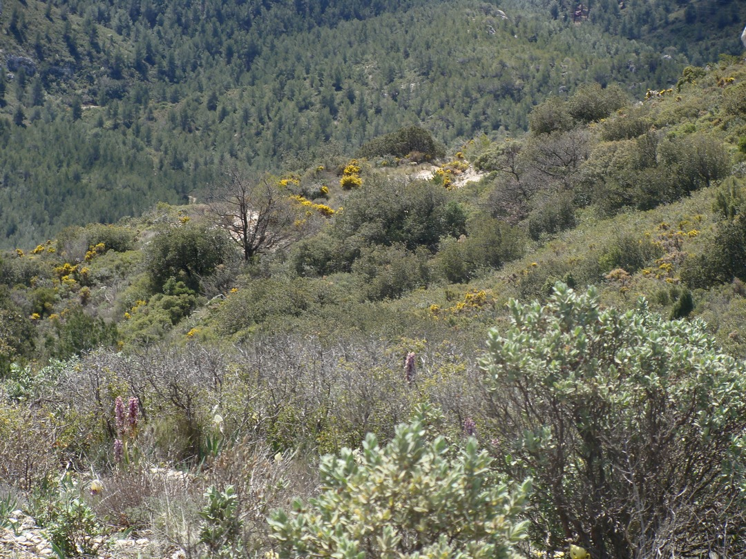 La végétation du massif de l'Étoile ; noter l'oppositon entre l'adret (au premier plan : végétaion basse, plantes à fleurs et broussailles) et l'ubac (au fond : résineux)